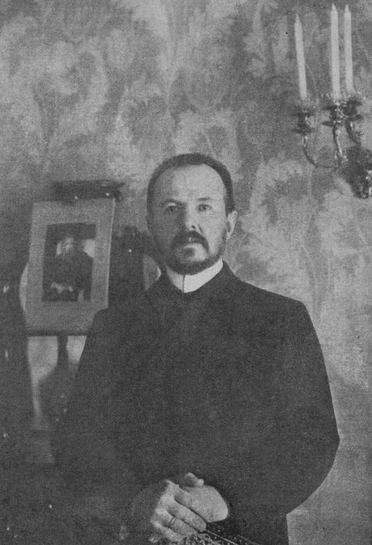 Alexeï Bellegarde en 1905